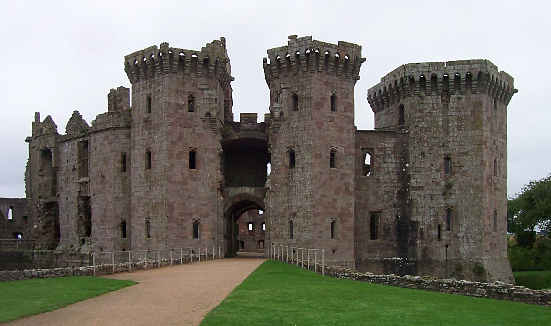 Raglan Castle